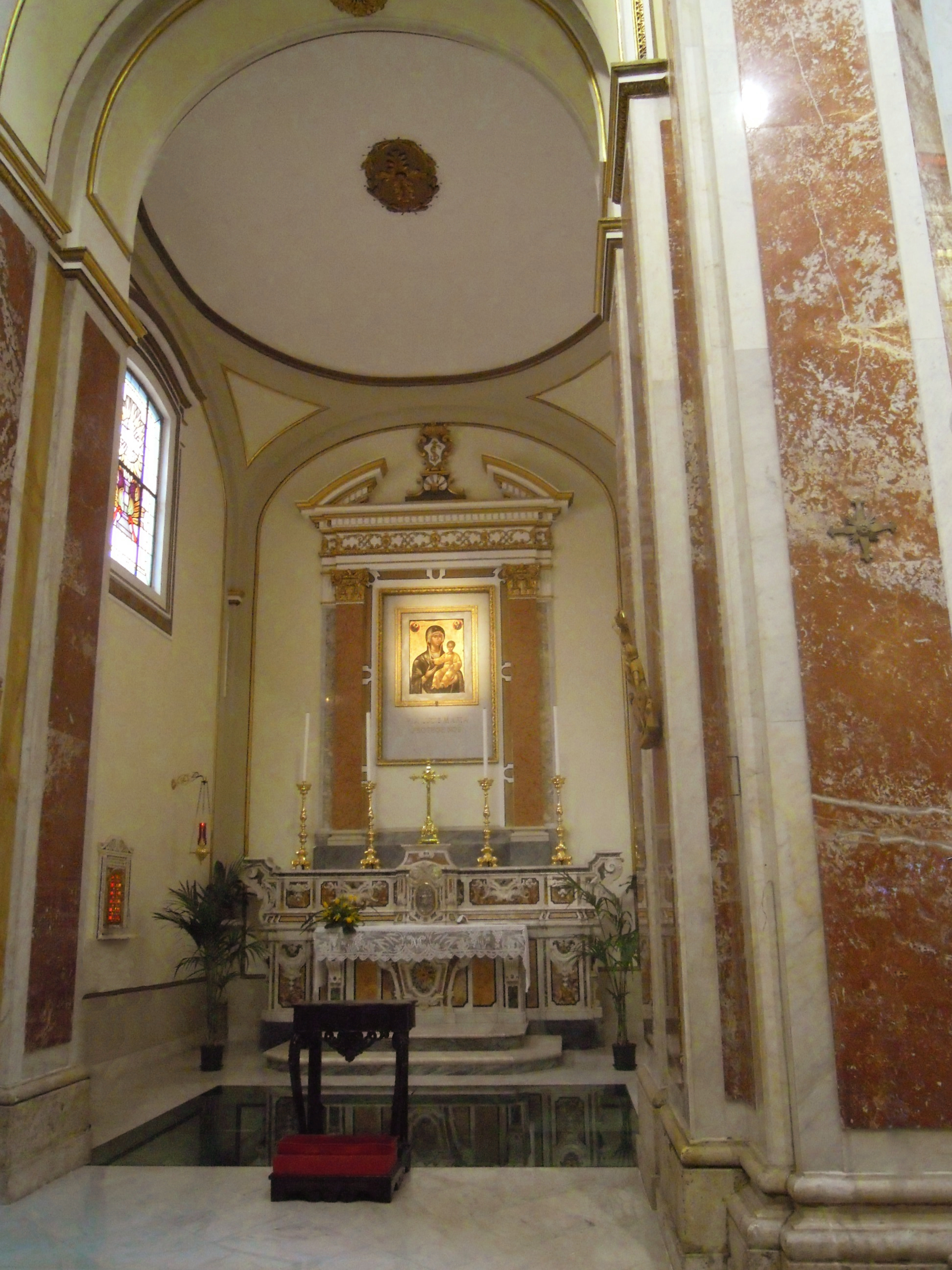 La cappella del Santissimo Sacramento all'interno della Cattedrale di San Pietro Apostolo, Isernia, situata alla sinistra dell'abside.